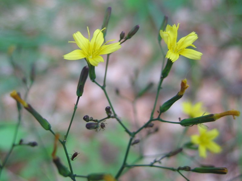 Mauerlattich Mycelis muralis, Müritz-Gebiet